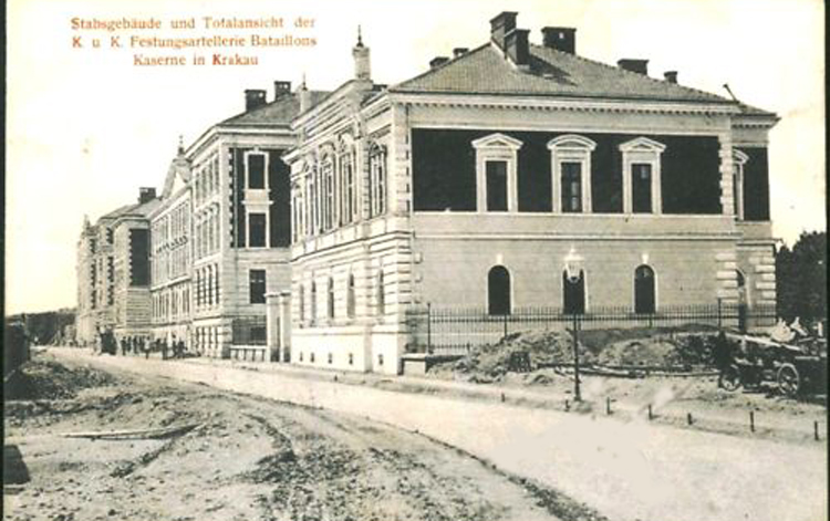 Kaserne Stab Festungsartillerieregiment 2 in Krakau